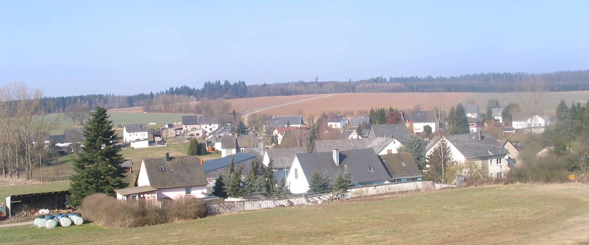 Todenroth im Hunsrück